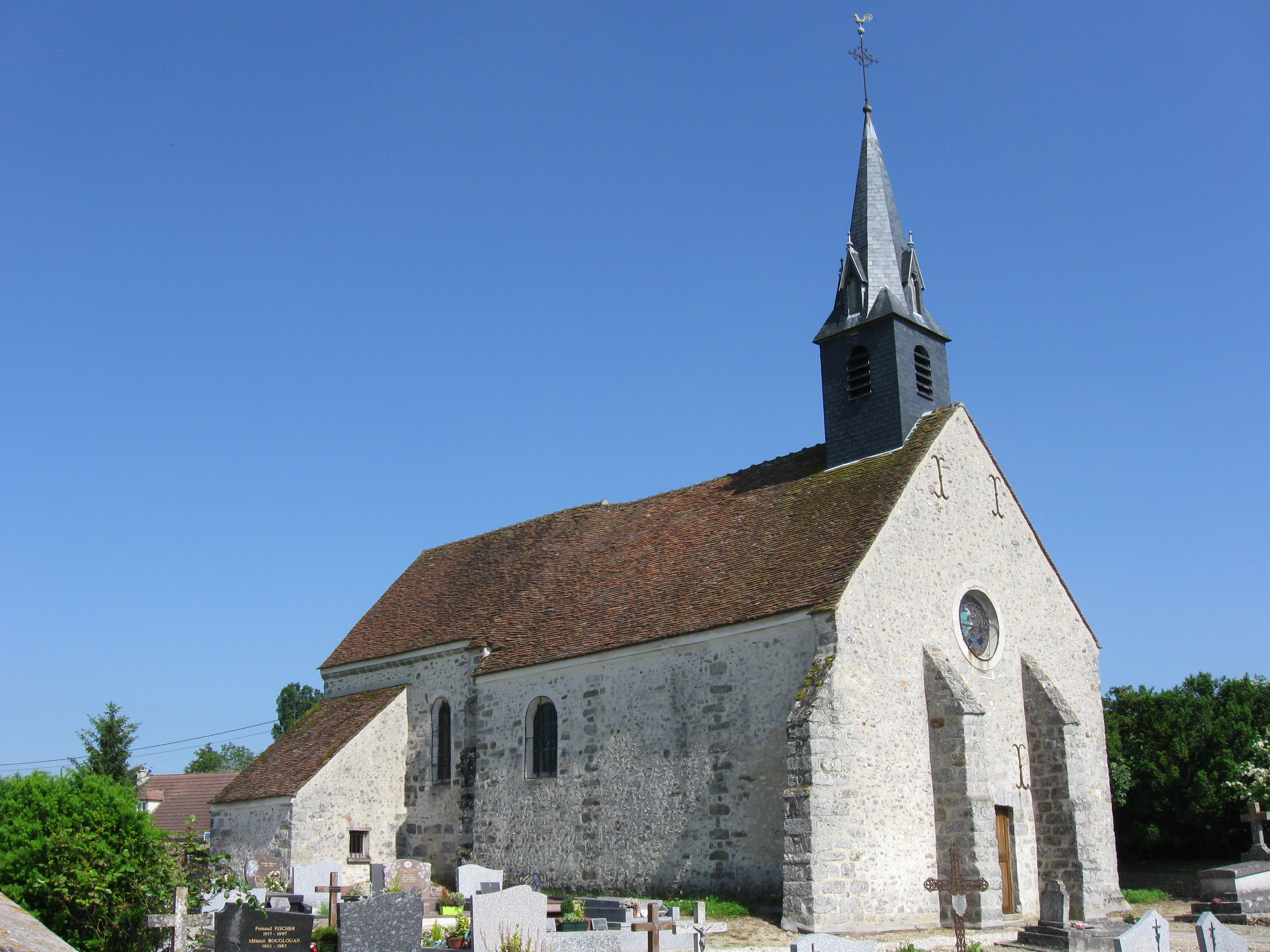 Église Saint-Just-et-Saint-Hubert de Saint-Just-en-Brie. (Seine-et-Marne, région Île-de-France).